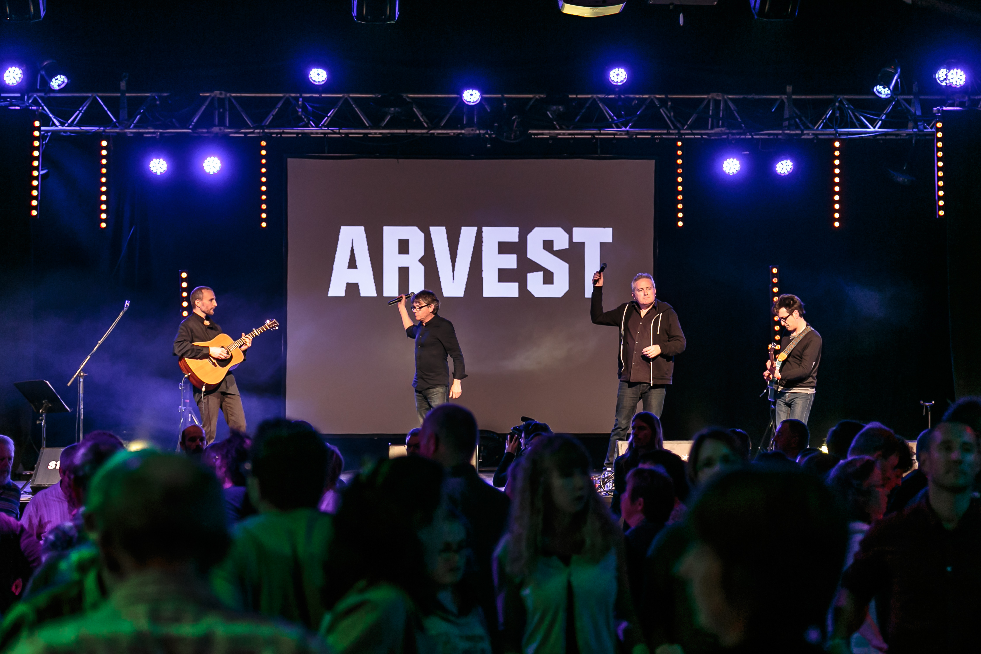 Arvest lors du fest-noz Stered au parc des expositions Lango de Morlaix le 9 avril 2016.